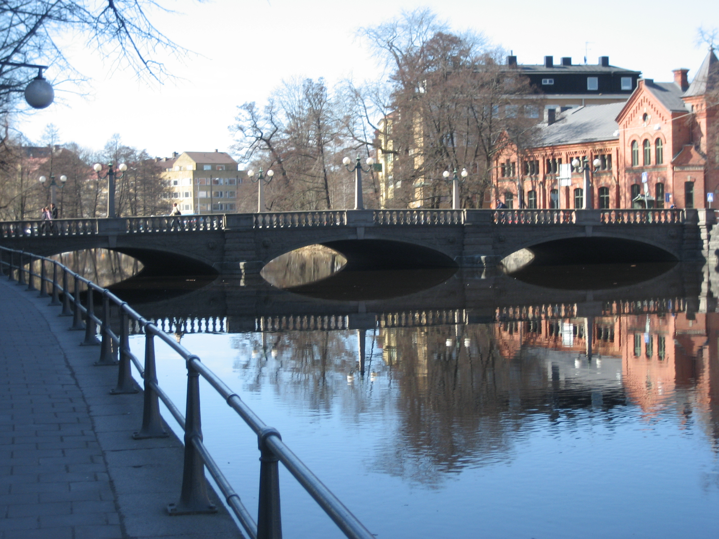 Vasabron in Örebro, Sweden